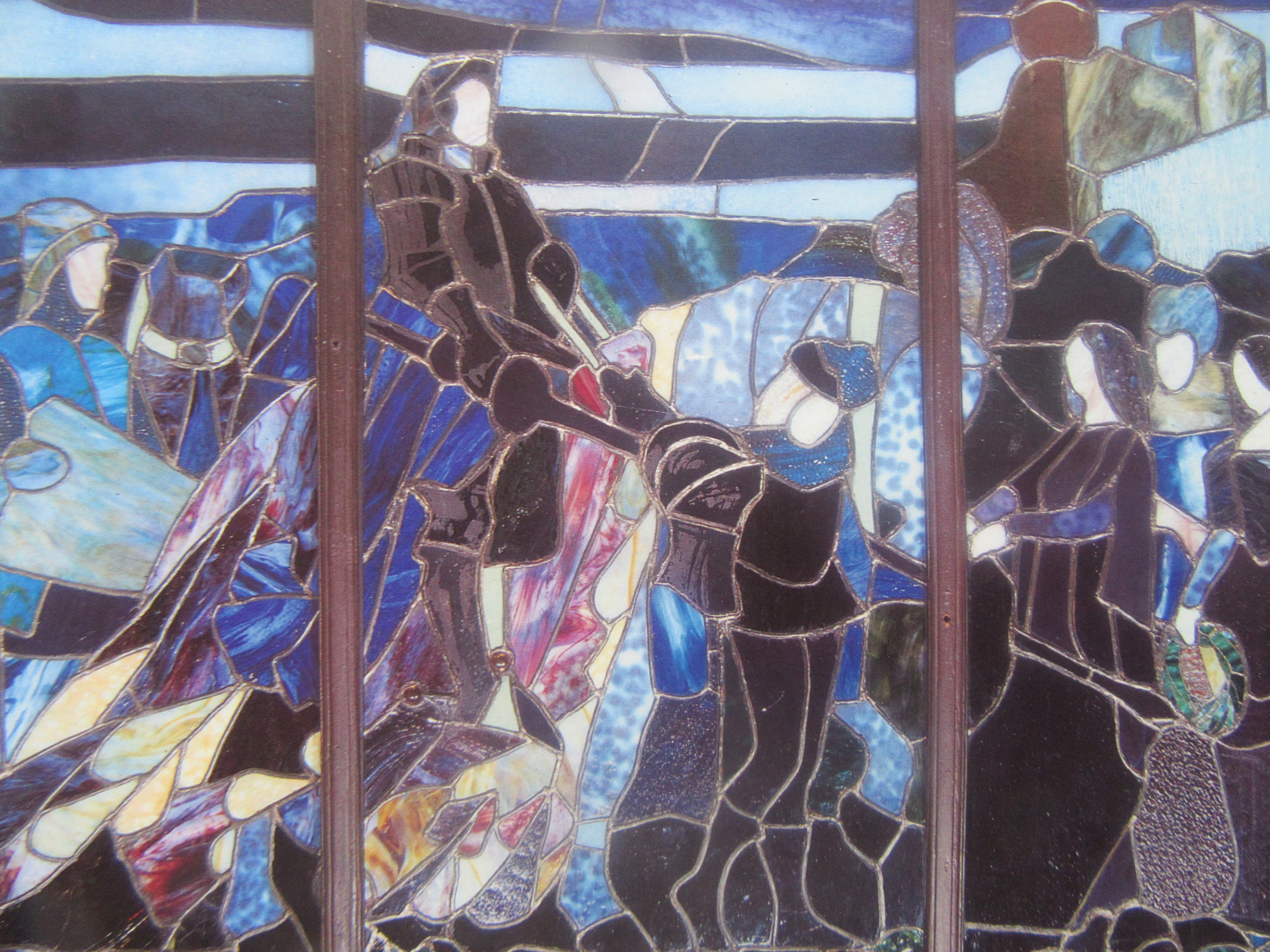 Vitrail ; verre coloré, détrempe Mikhaïl Vroubel